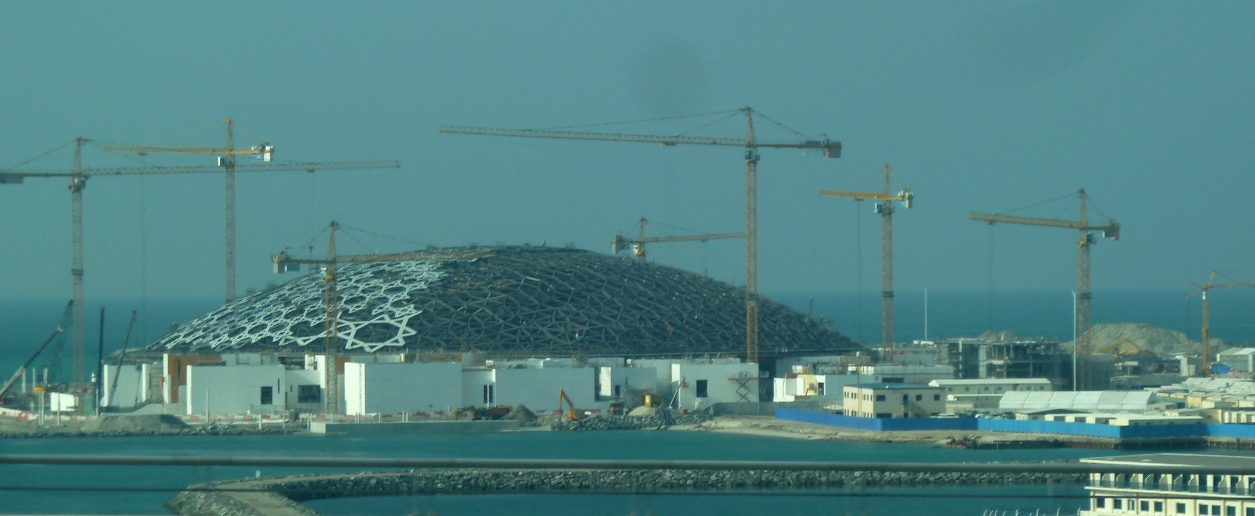 Abu Dhabi - Saadiyat Iceland - Louvre Abu Dhabi under construction --- السعديات أيسلندا - متحف اللوفر أبو ظبي تحت الإنشاء